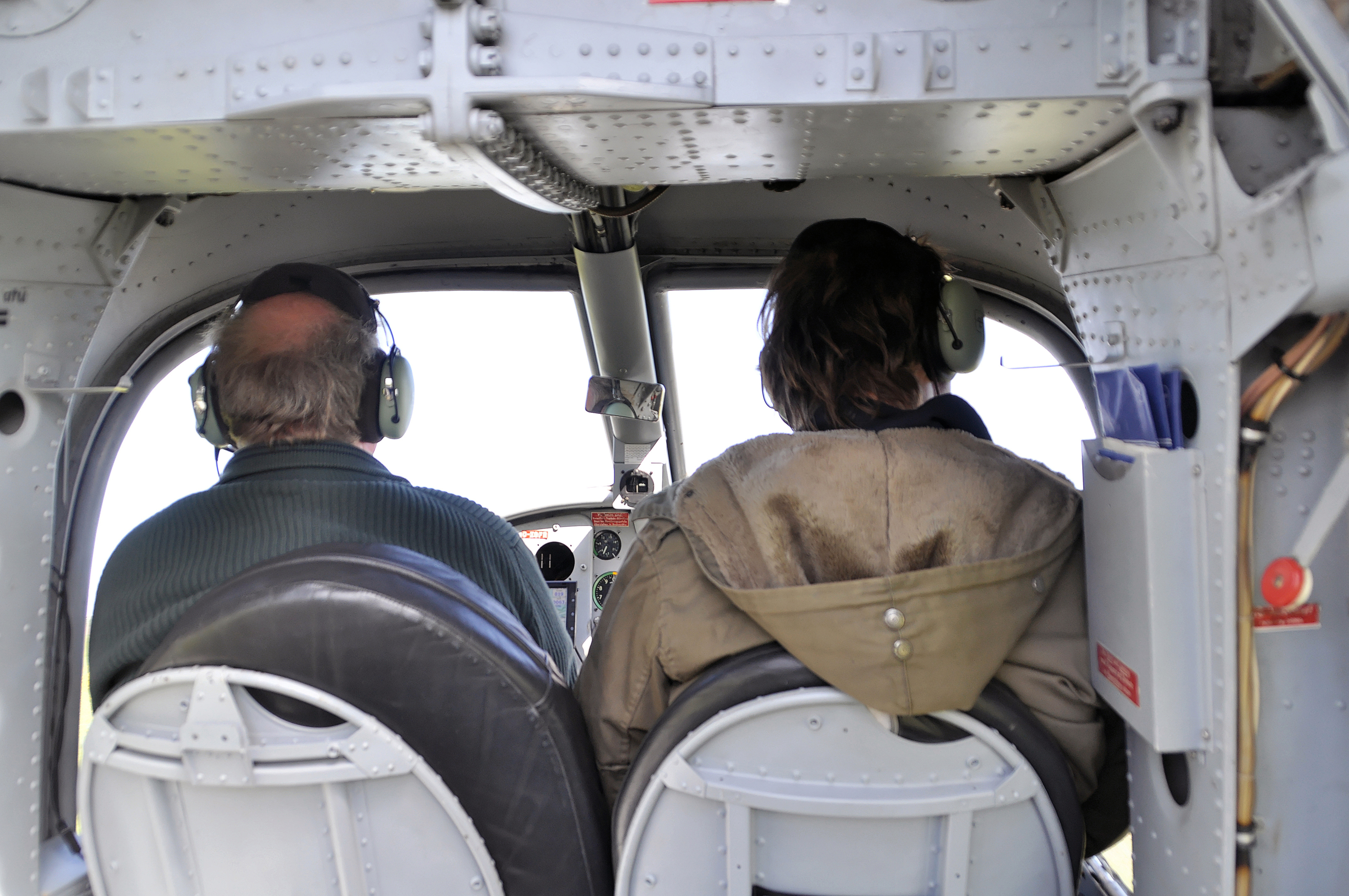 Luftbilder von der Nordseeküste 2012-05